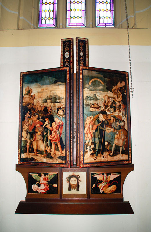 In geschlossenem Zustand präsentiert sich der Abschied der Apostel. Der biblisch nicht überlieferte Abschied der reisefertigen oder bereits auf der Wanderschaft befindlichen Apostel findet vor einer weiten Weltlandschaft statt.